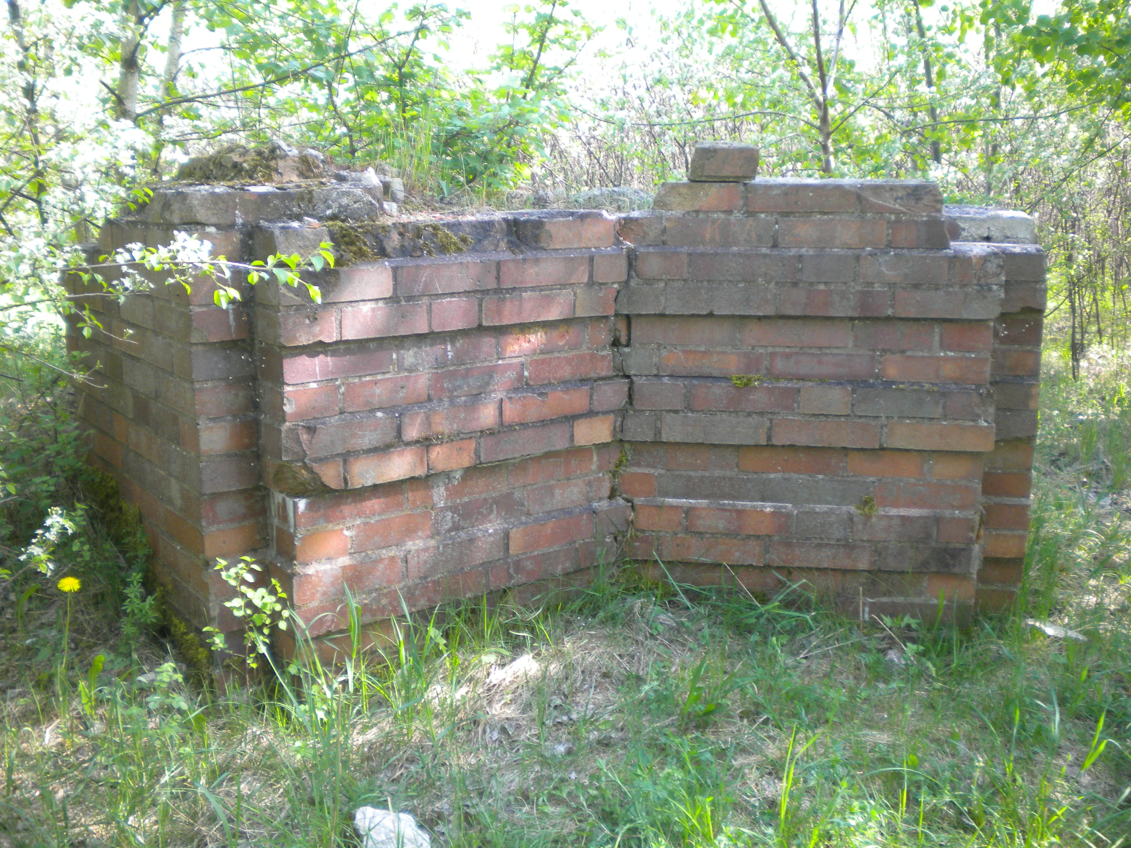 Mauerreste des Tannenberg Denkmals in Olsztynek aufgenommen 9. Mai 2012